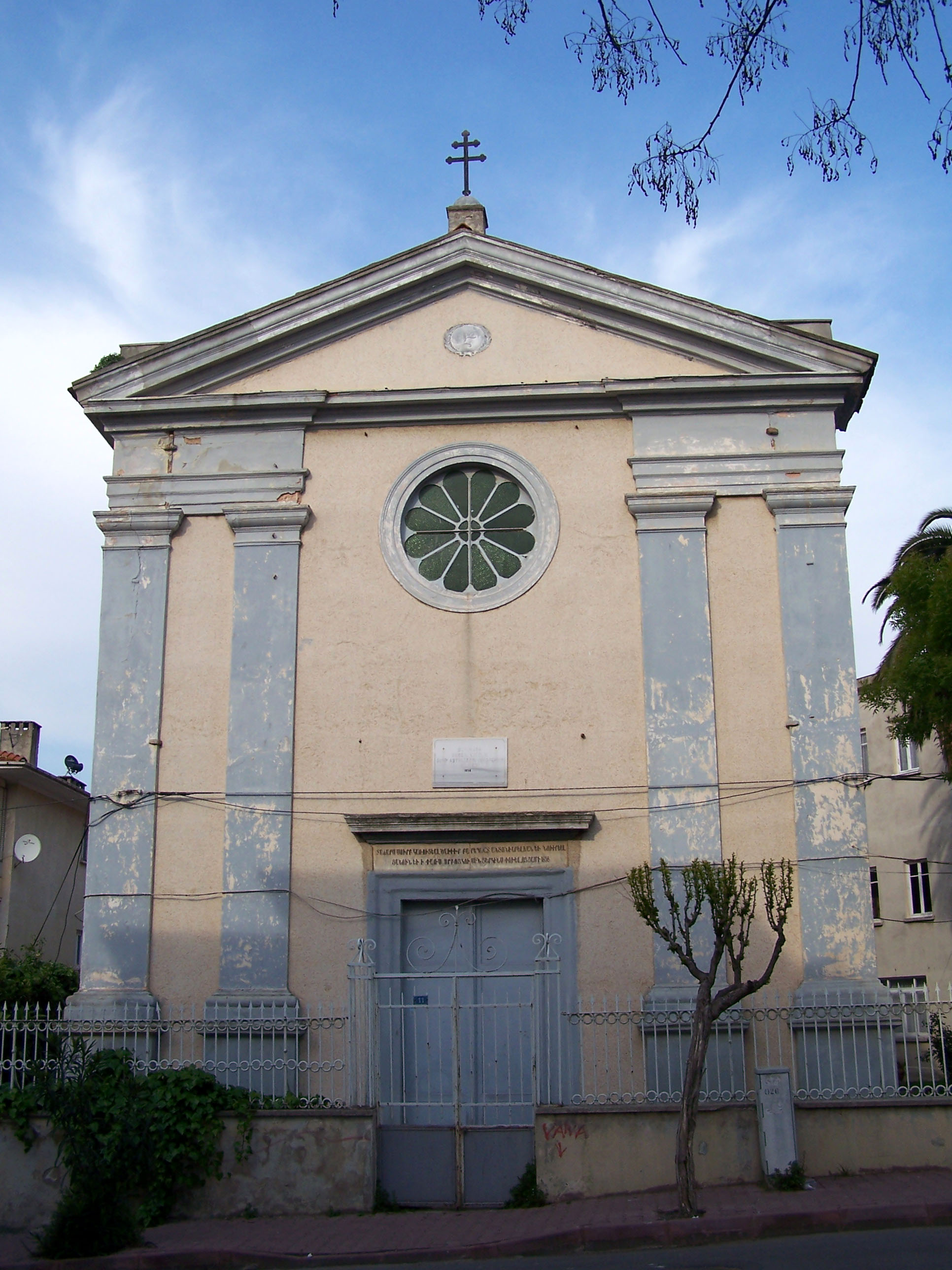 Büyükada Ermeni Katolik Surp Astvazazin Verapohum Kilisesi (Assumption Armenian Catholic Church) in Büyükada, Turkey